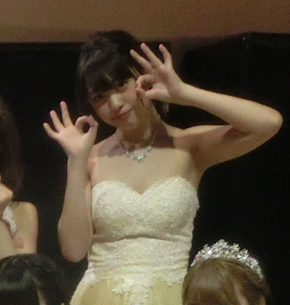 mitaan2018 DMM R-18 アダルトアワード2018（ディファ有明）